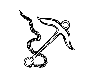 Логотип Клуба Речников